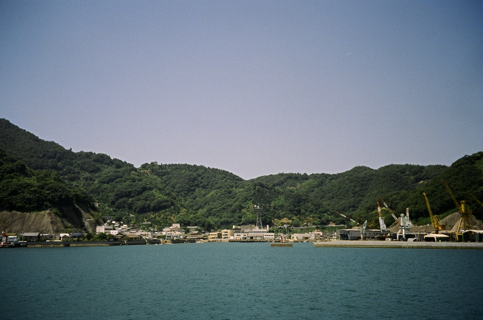 大崎上島町、木江港。